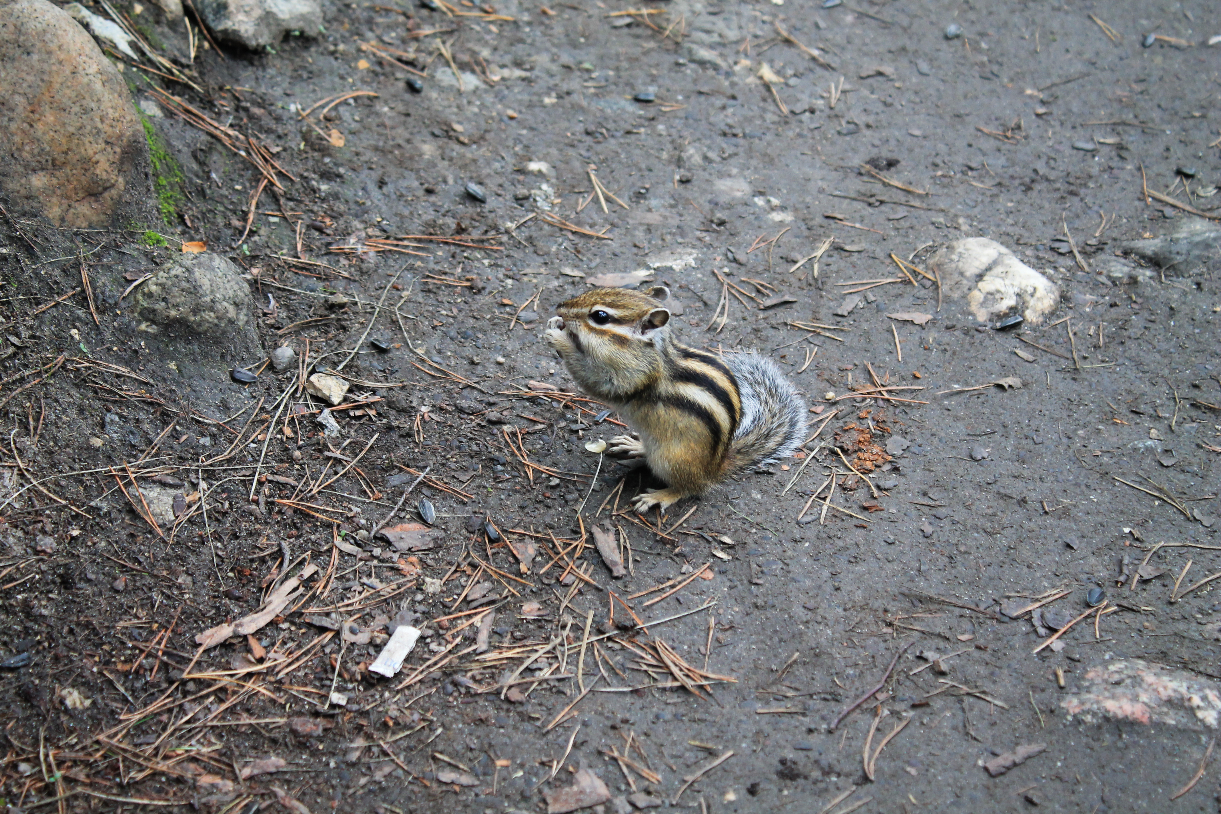 Аршан: Тункинский район, Бурятия This image is related to the protected area of Russia number 0310113